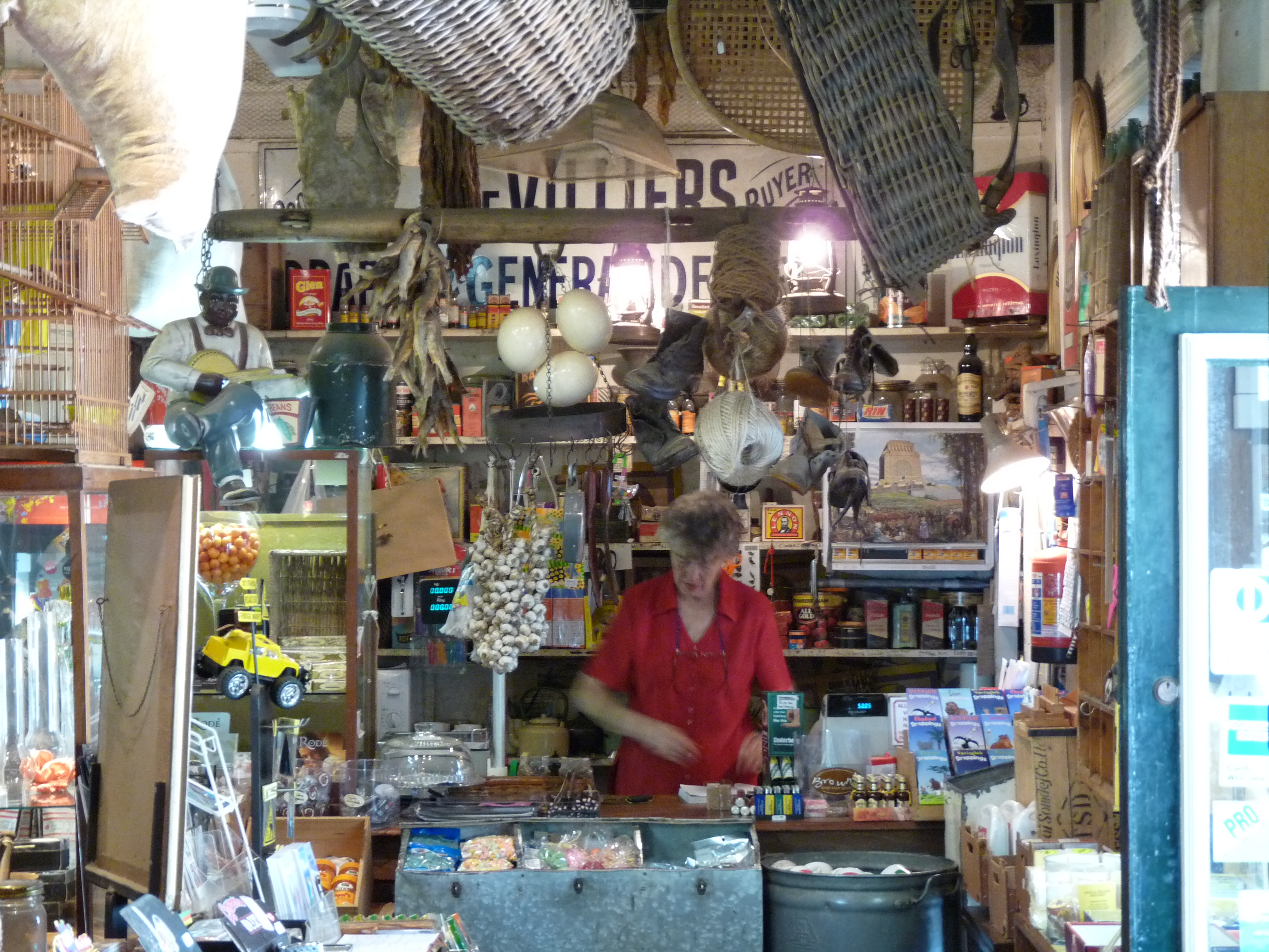 Oom Samie se winkel 01